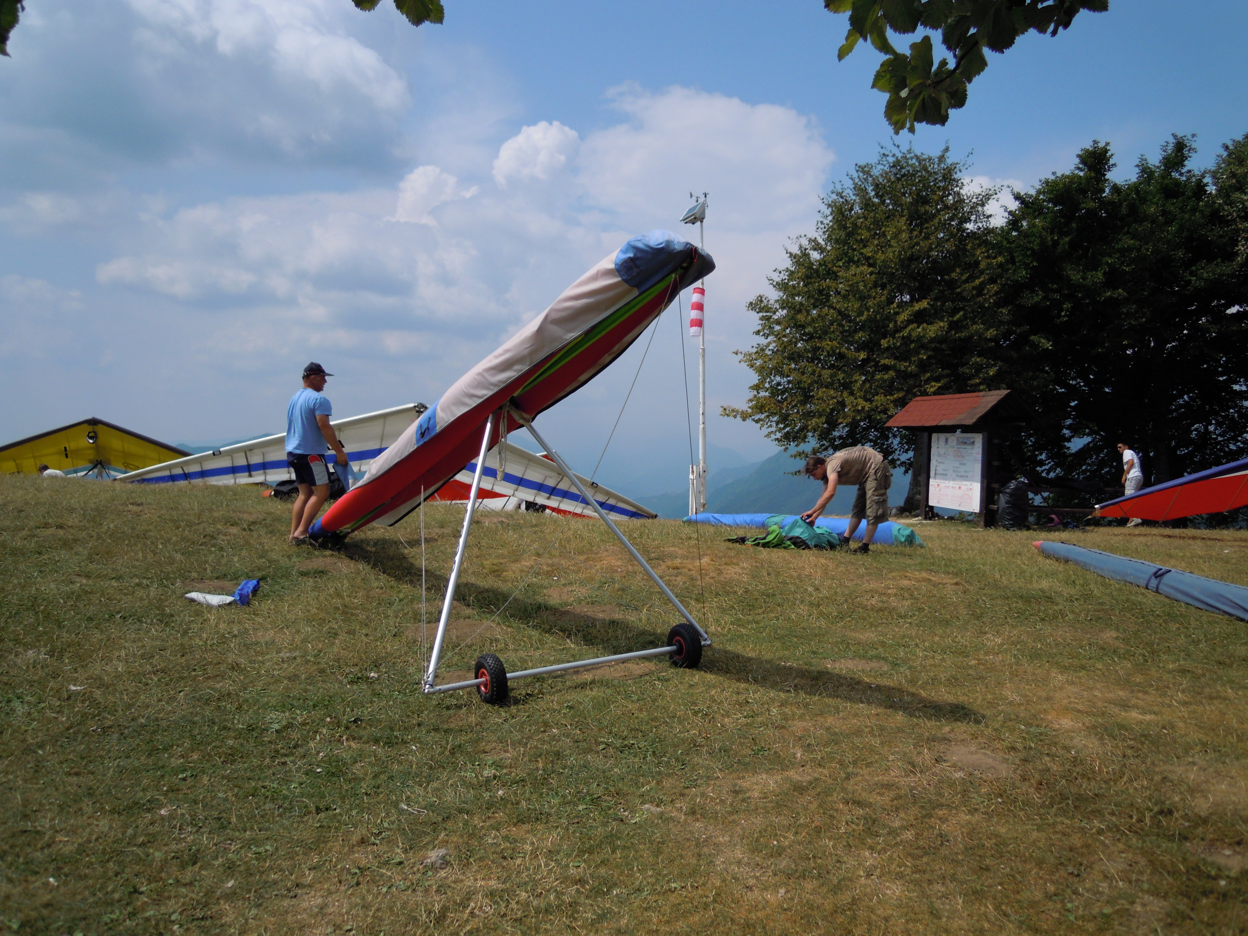 Cevi triangla.